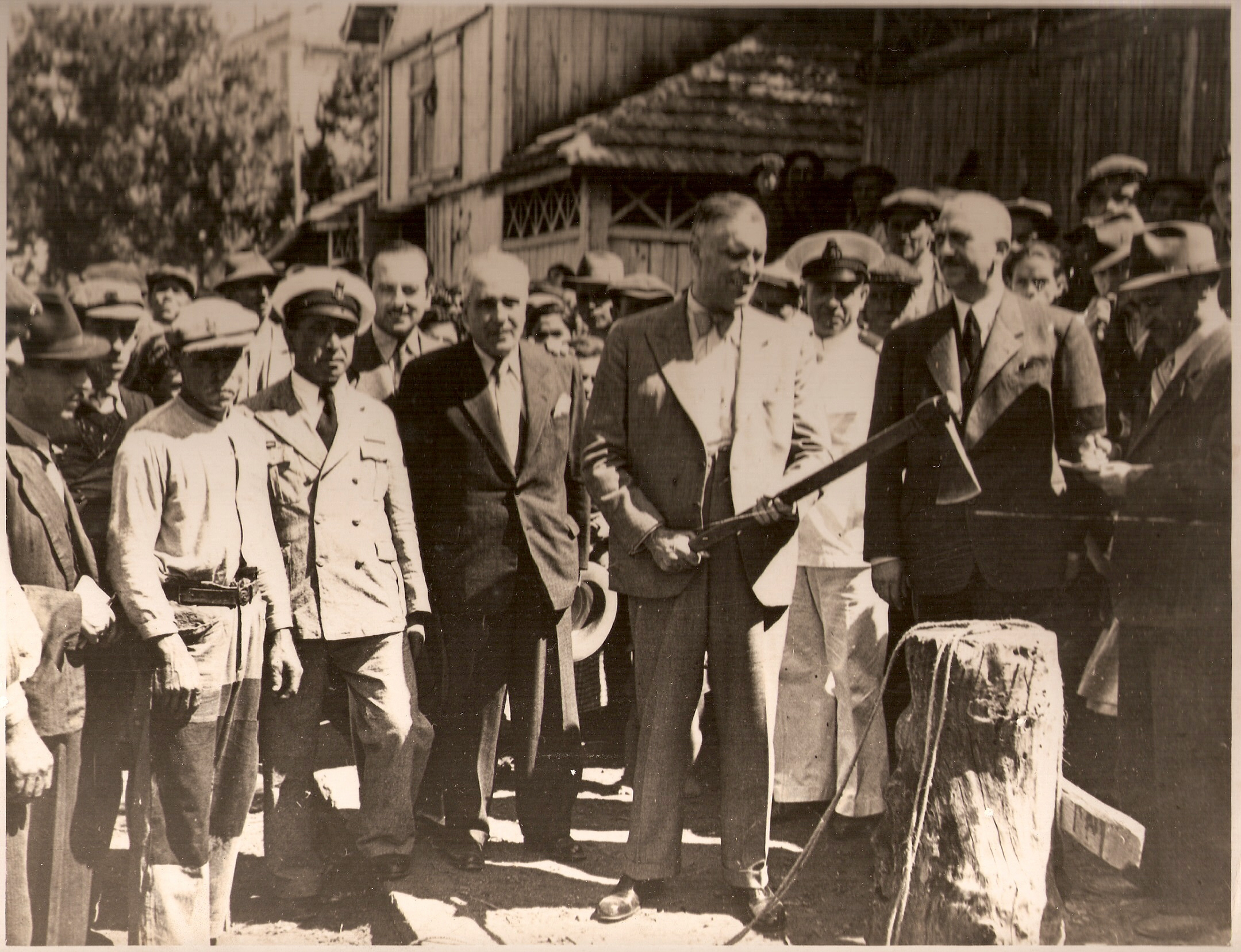 Receção de navio para a Companhia de Navegação Carregadores Açorianos por Francisco Luís Tavares